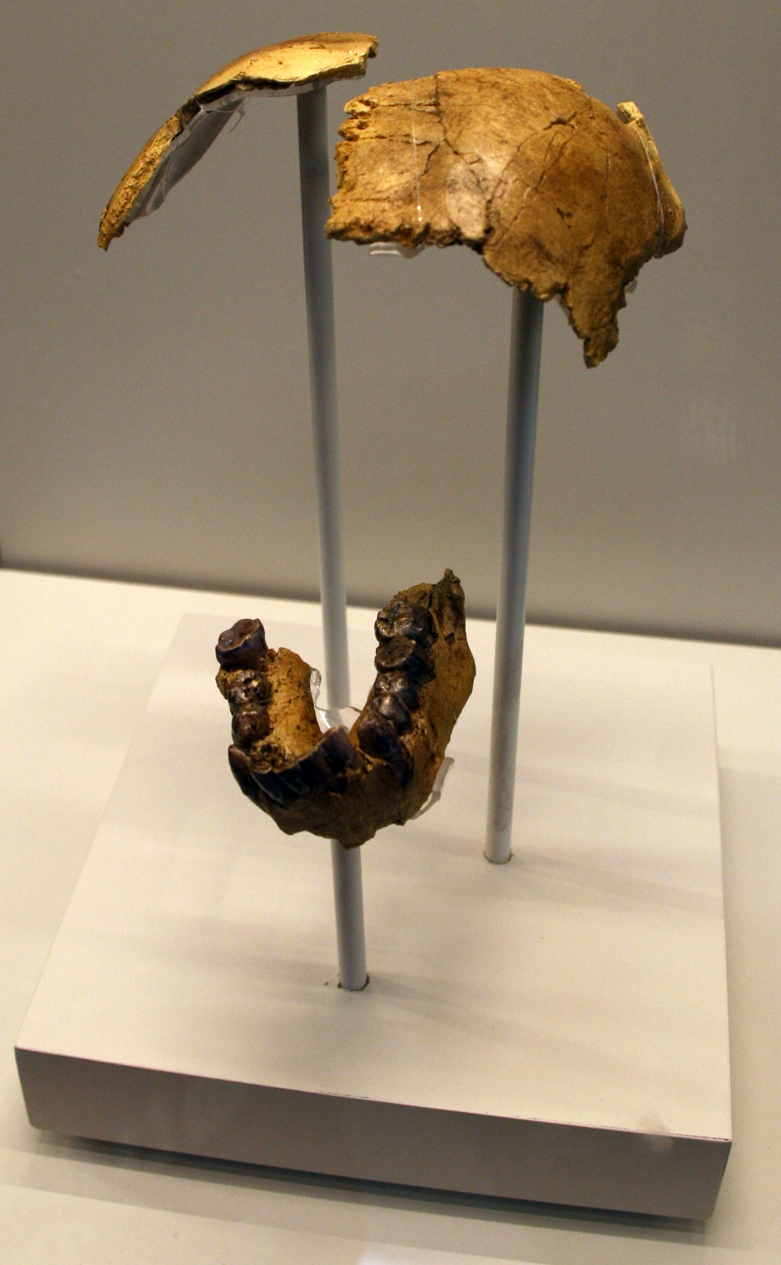 Parietales y mandíbula de Homo habilis, OH 7 o "Johnny's Child". Réplica. Holotipo de la especie. Posiblemente un varon de entre 10 y 12 años. Descubierto por John Leakey Original: FLK NN, Garganta de olduvai (Tanzania) 1,7 millones de años Museo Nacional de Dar Es Salaam (Tanzania) Réplica: Instituto de Evolución en África Exhibido en exposición temporal, "La cuna de la humanidad", en el Museo Arqueológico de Regional de Madrid